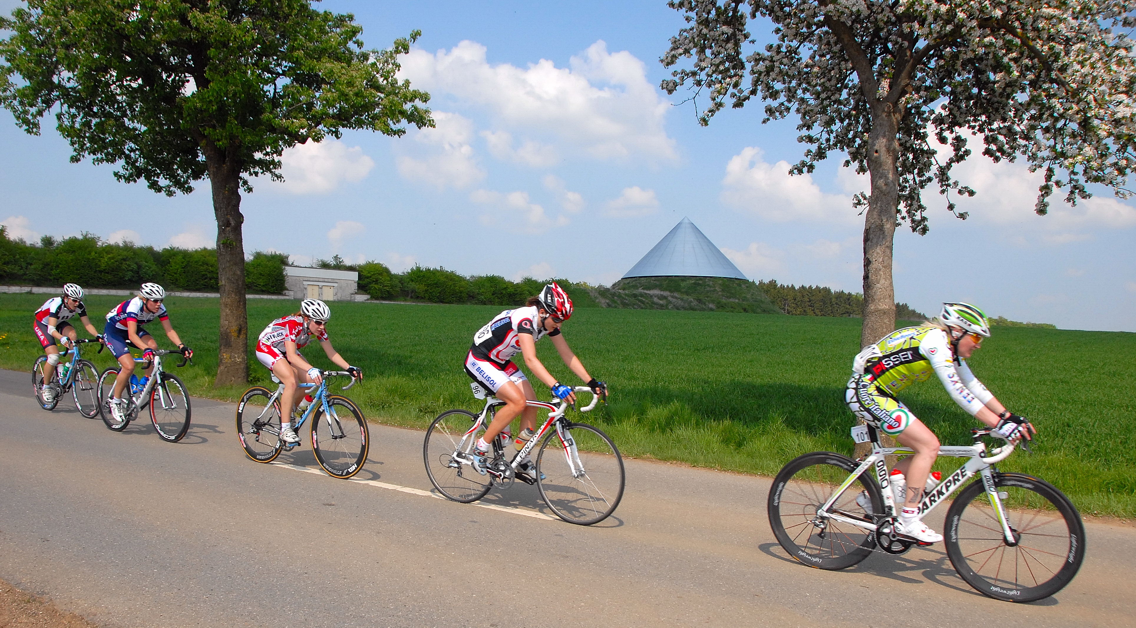 Grand Prix Elsy Jacobs 2009 um Réibierg.